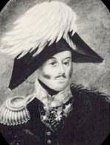 Antoni Potocki (1780-1850)– członek rodu Potockich; hrabia, generał brygady, senator, tajny radca